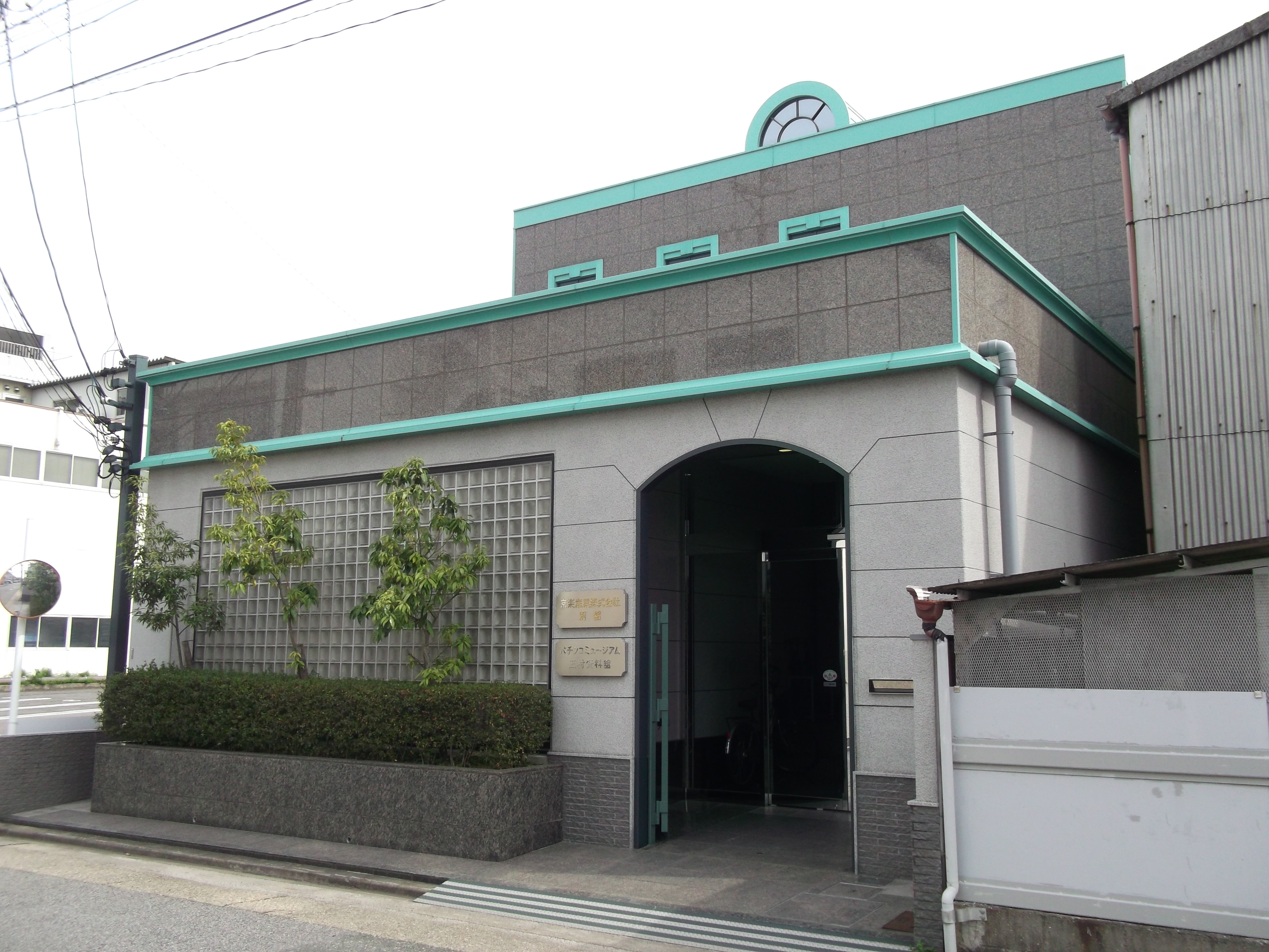 名古屋市天白区中砂町の京楽産業別館「パチンコミュージアム正村資料館」を北側公道西側より撮影